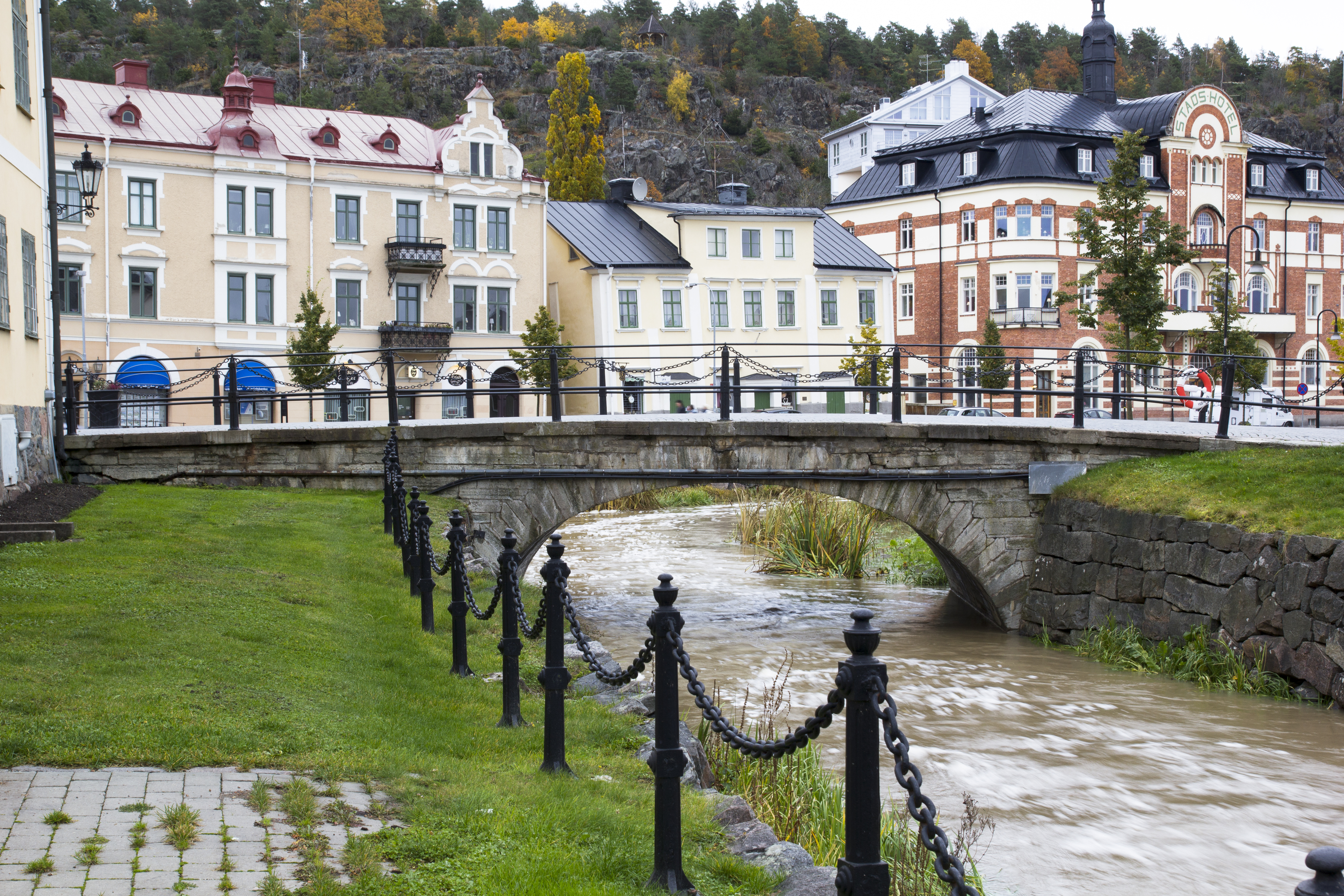 Bro, Storgatan, västerifrån.